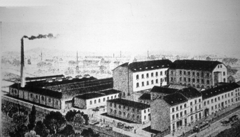 Haarener Tuchfabrik im Aachener Ortsteil Haaren, auch bekannt als Tuchfabrik Rummeny